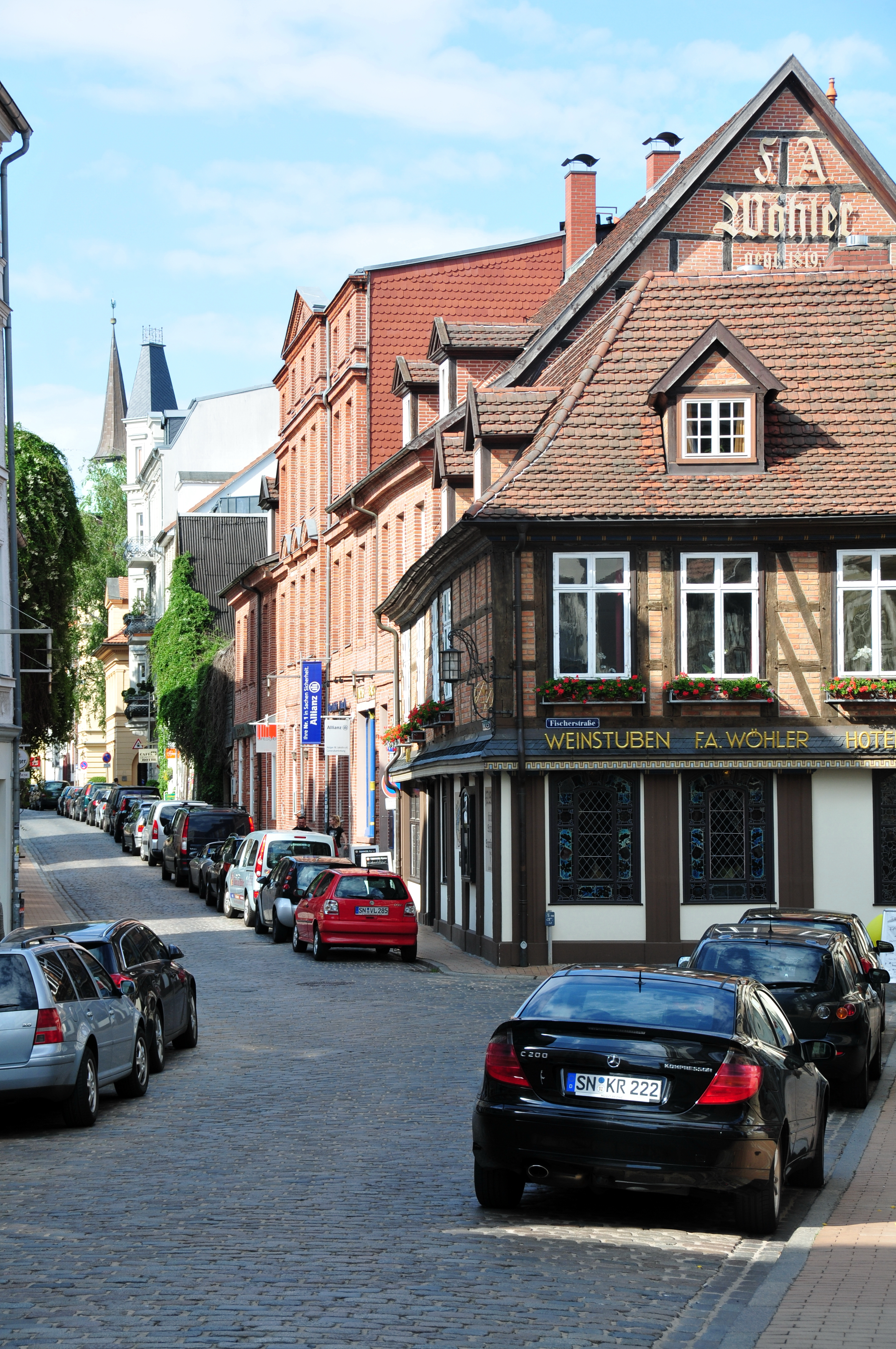 Schwerin; mit 50mm Brennweite von der Orangerie zum Bahnhof 16:13 Uhr: Straßenszene Altstadt von Schwerin